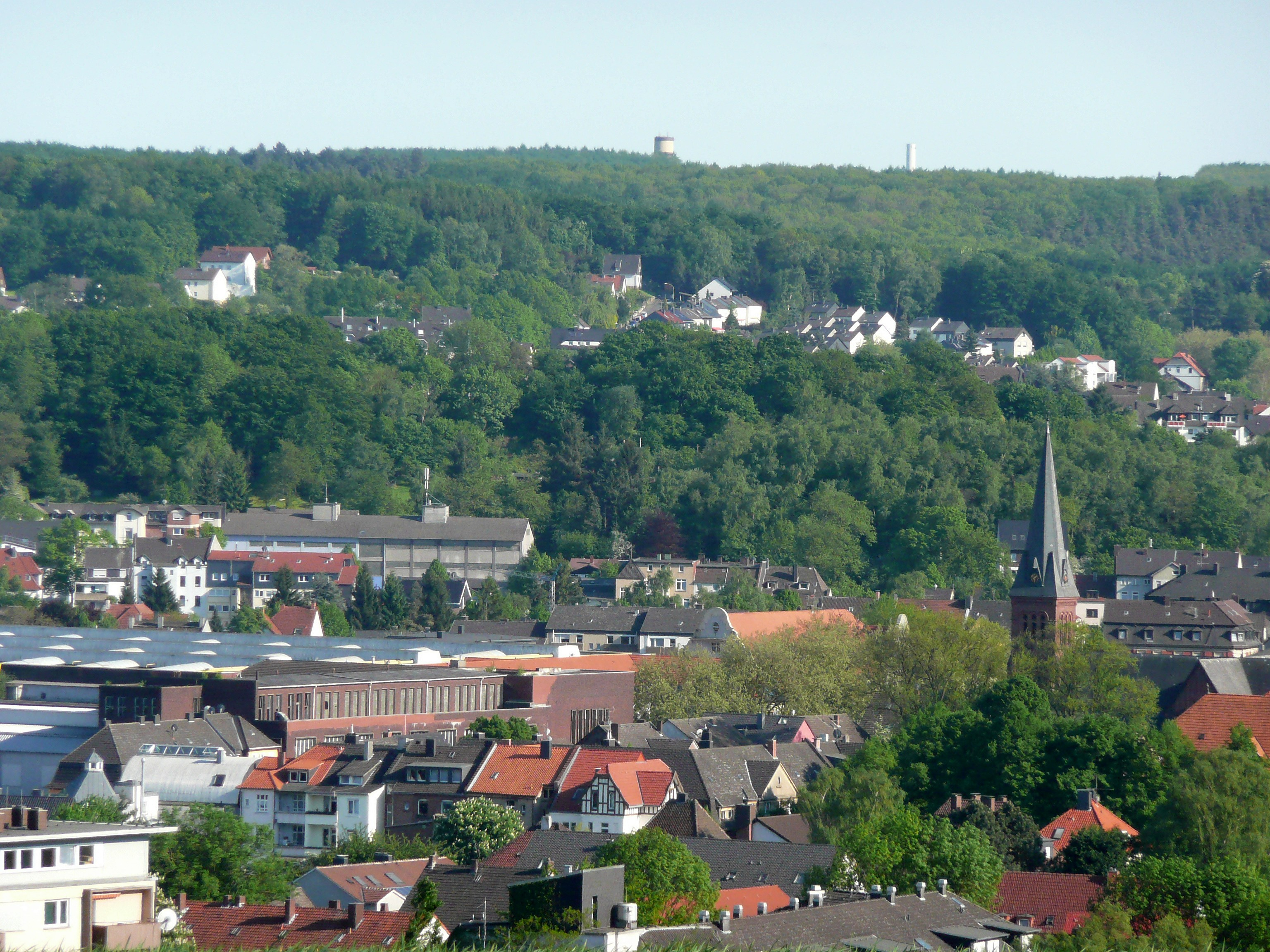 Industriegebiet Witten-Annen im Hintergrund der Wasserturm Kermelberg und der Schornstein des Cuno-Kraftwerks